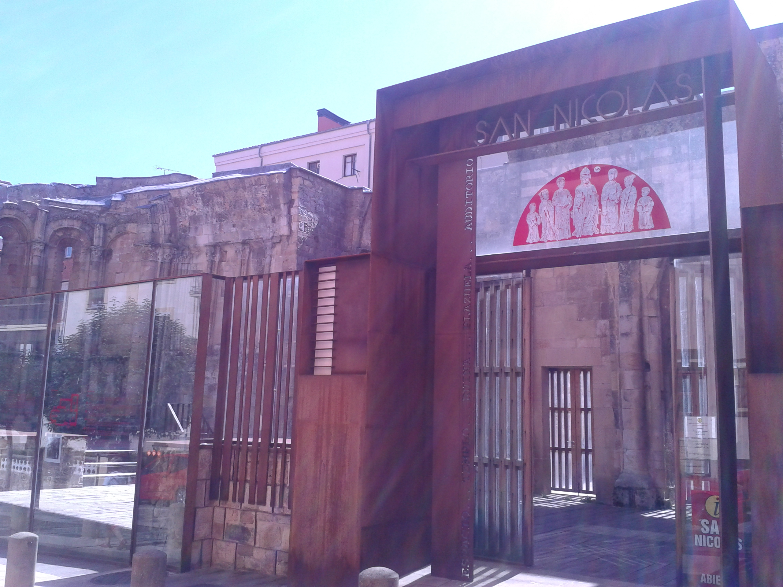 Foto de la Iglesia de San Nicolás (Soria)